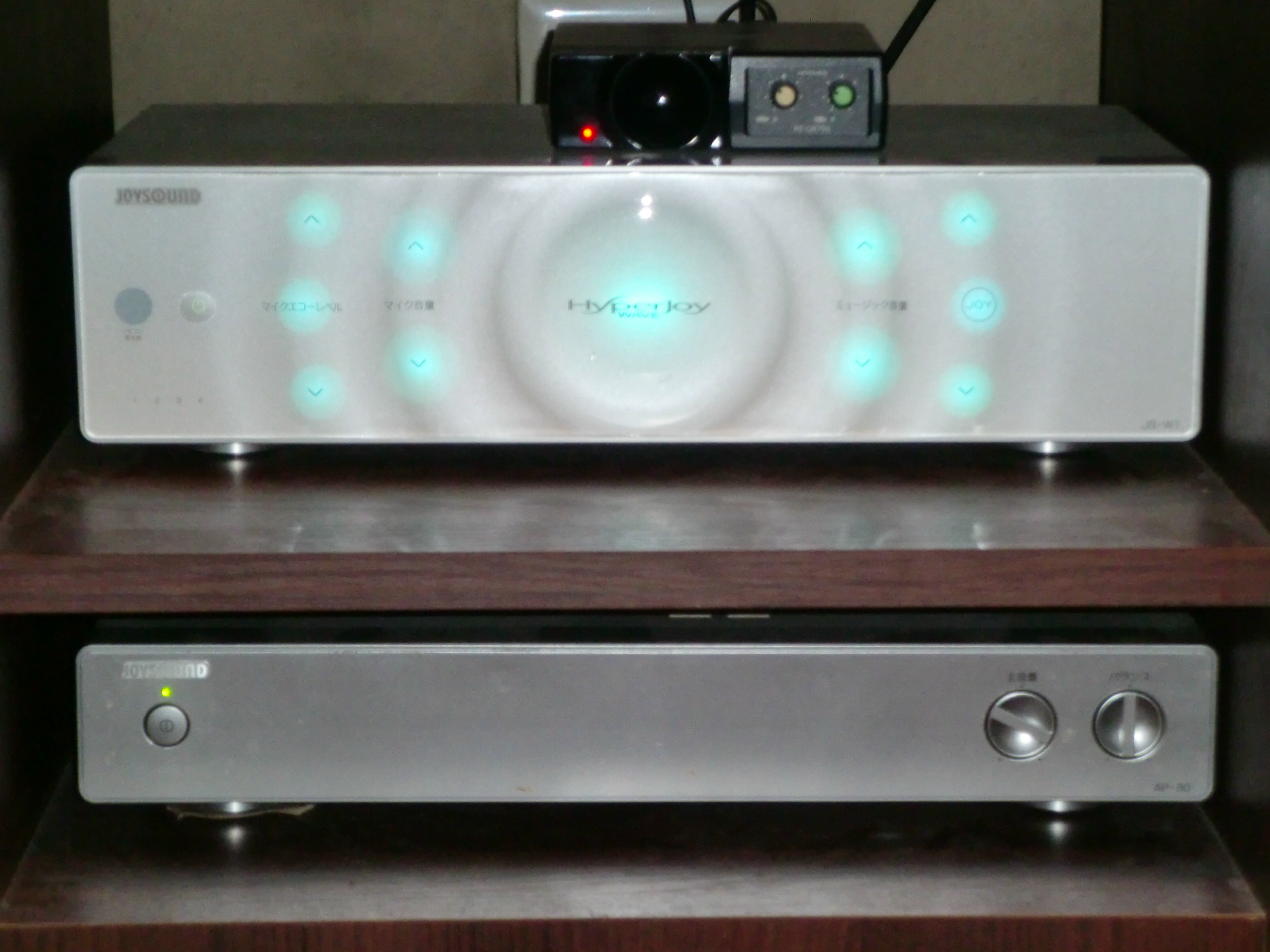 エクシングのカラオケ機種『HyperJoyWAVE(JS-W1)』